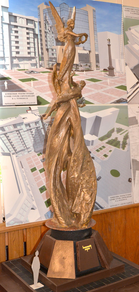 Проєкт пам'ятника Небесній сотні, що був установлений на Площі Героїв Євромайдану в Тернополі.